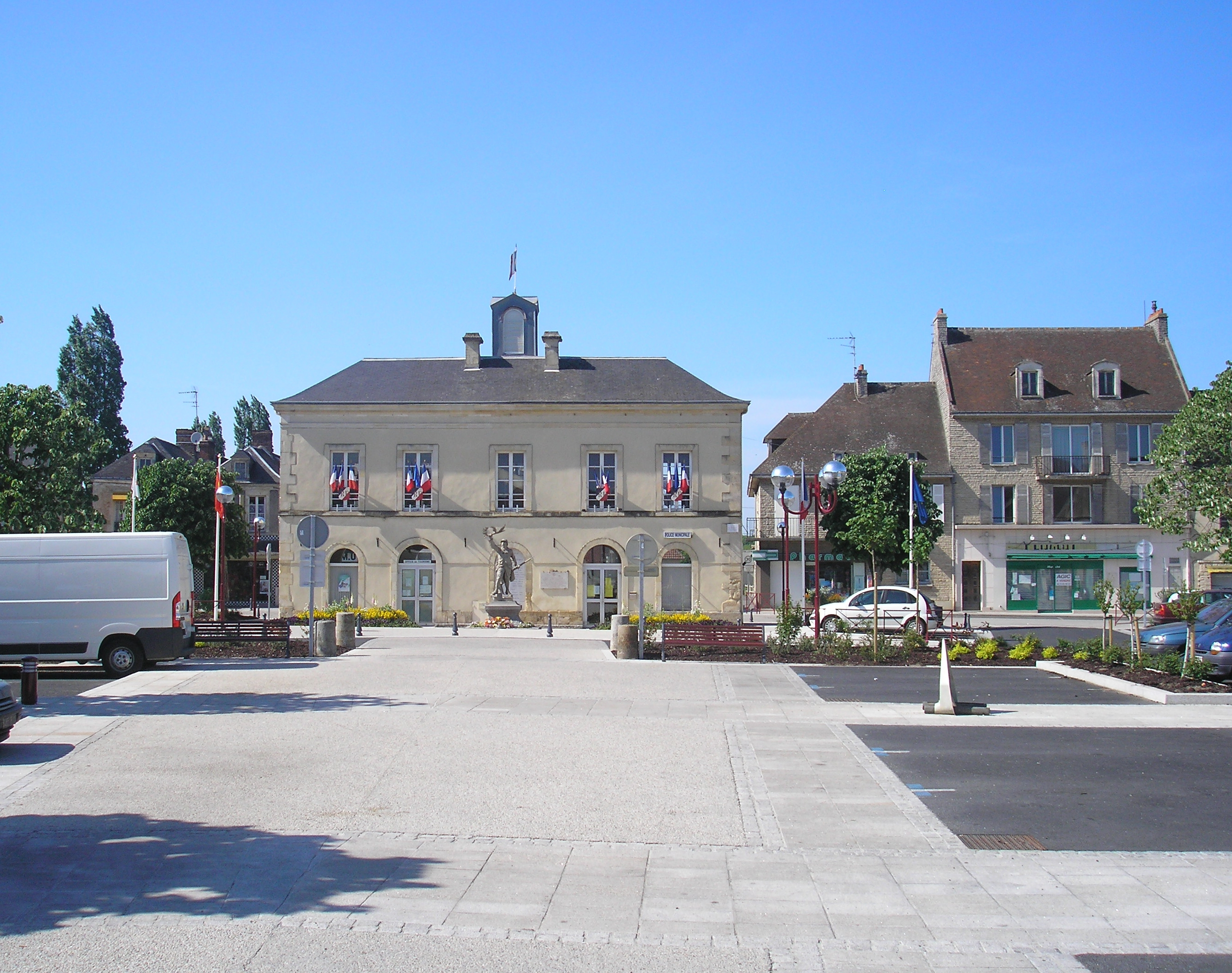 Troarn (Normandie, France). La place Paul Quellec.